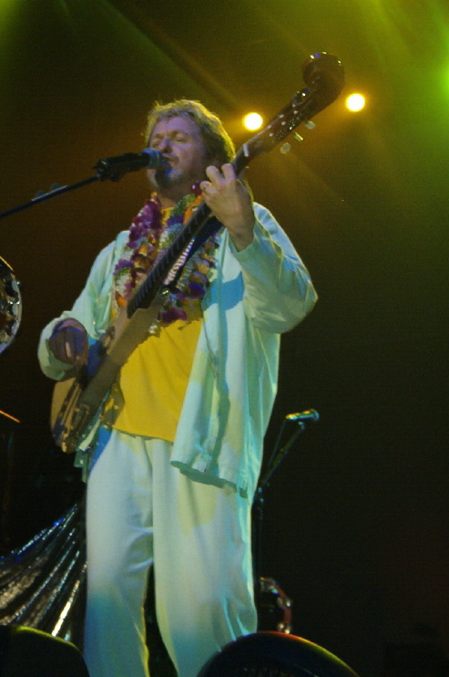 Jon Anderson (Yes)